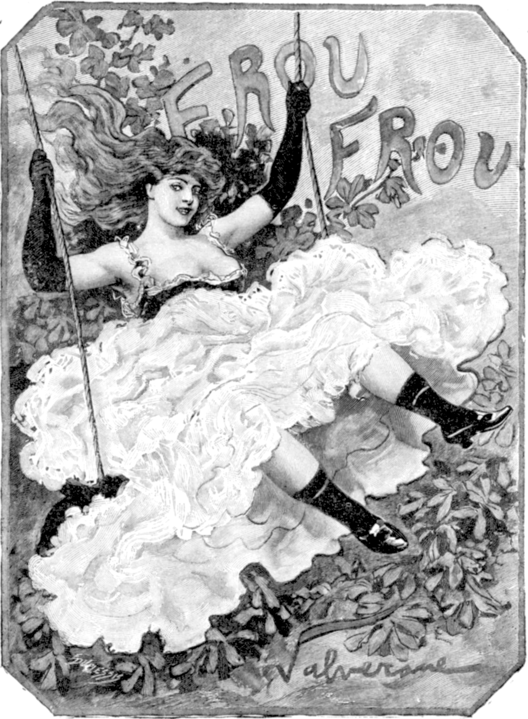 Le Frou Frou